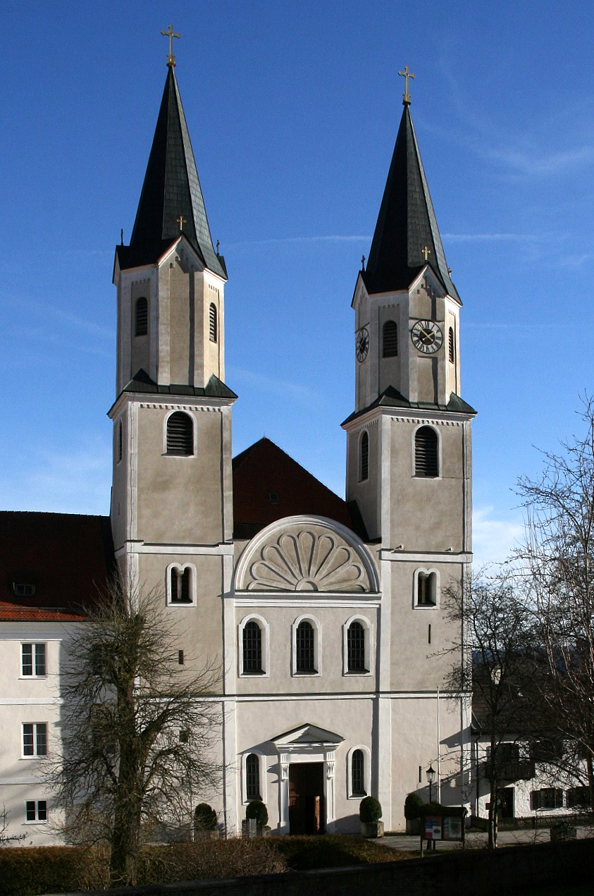 Vorderseite der Klosterkirche Gars am Inn (Landkreis Mühldorf am Inn, Oberbayern). Die Doppelturmfassade besitzt romanische, barocke und historistische Partien, die wechselvolle Geschichte des Klosters nachzeichnend.